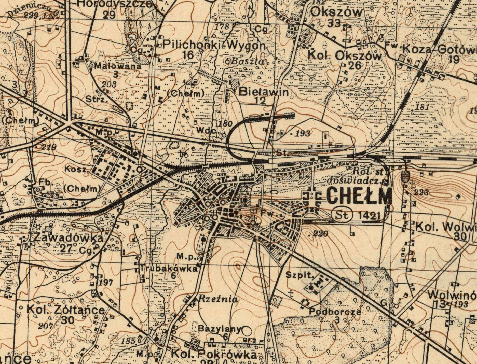 Wojskowa mapa okolic Chełma z 1931, wydawca Wojskowy Instytut Geograficzny, typ mapy: typ III, wzór: 1929, siatka QS co 2 km, południk zerowy Greenwich, 2-kolorowa (treść podstawowa - czarny, warstwice - brązowy).